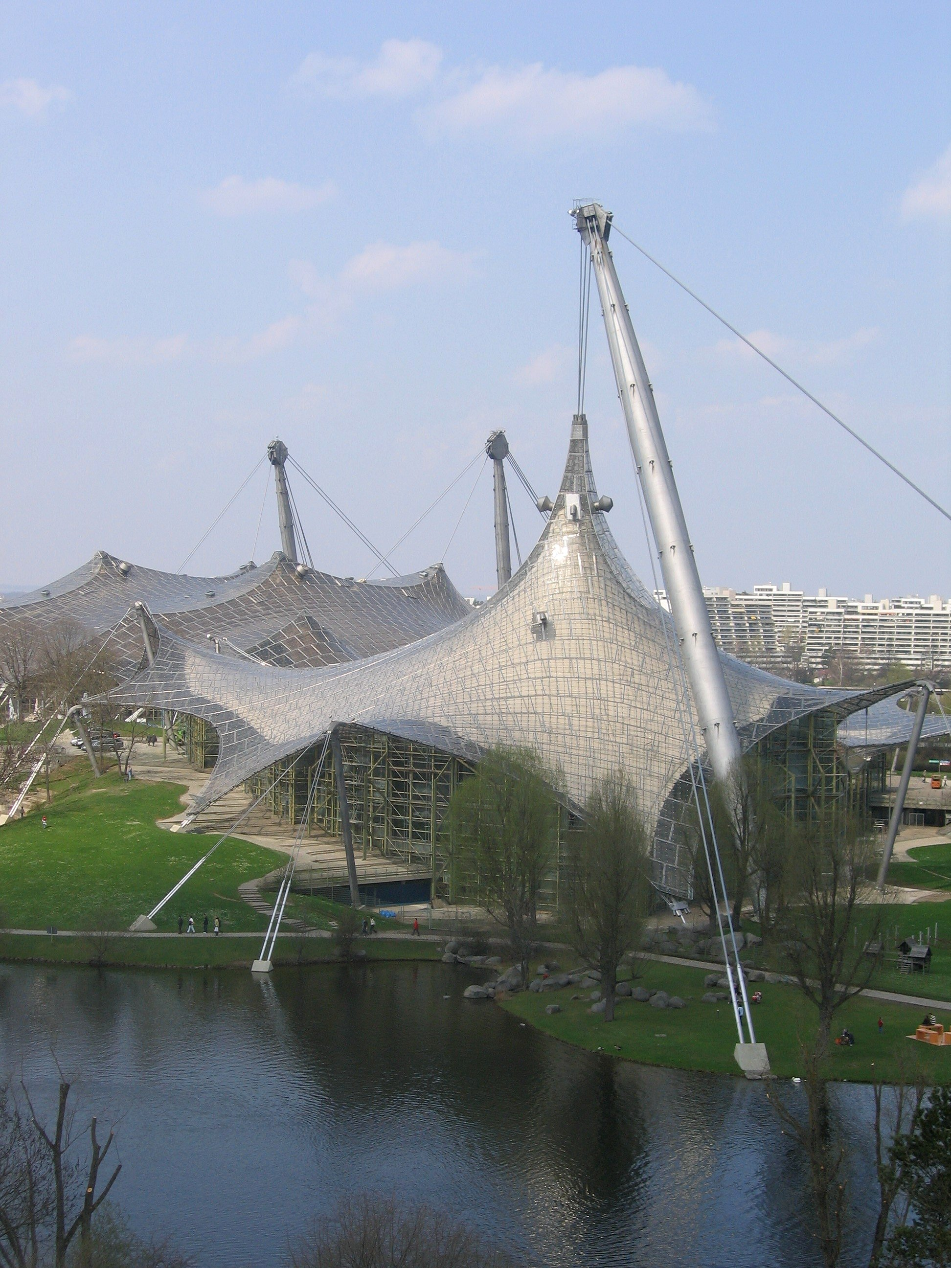 Olympia-Schwimmhalle, München